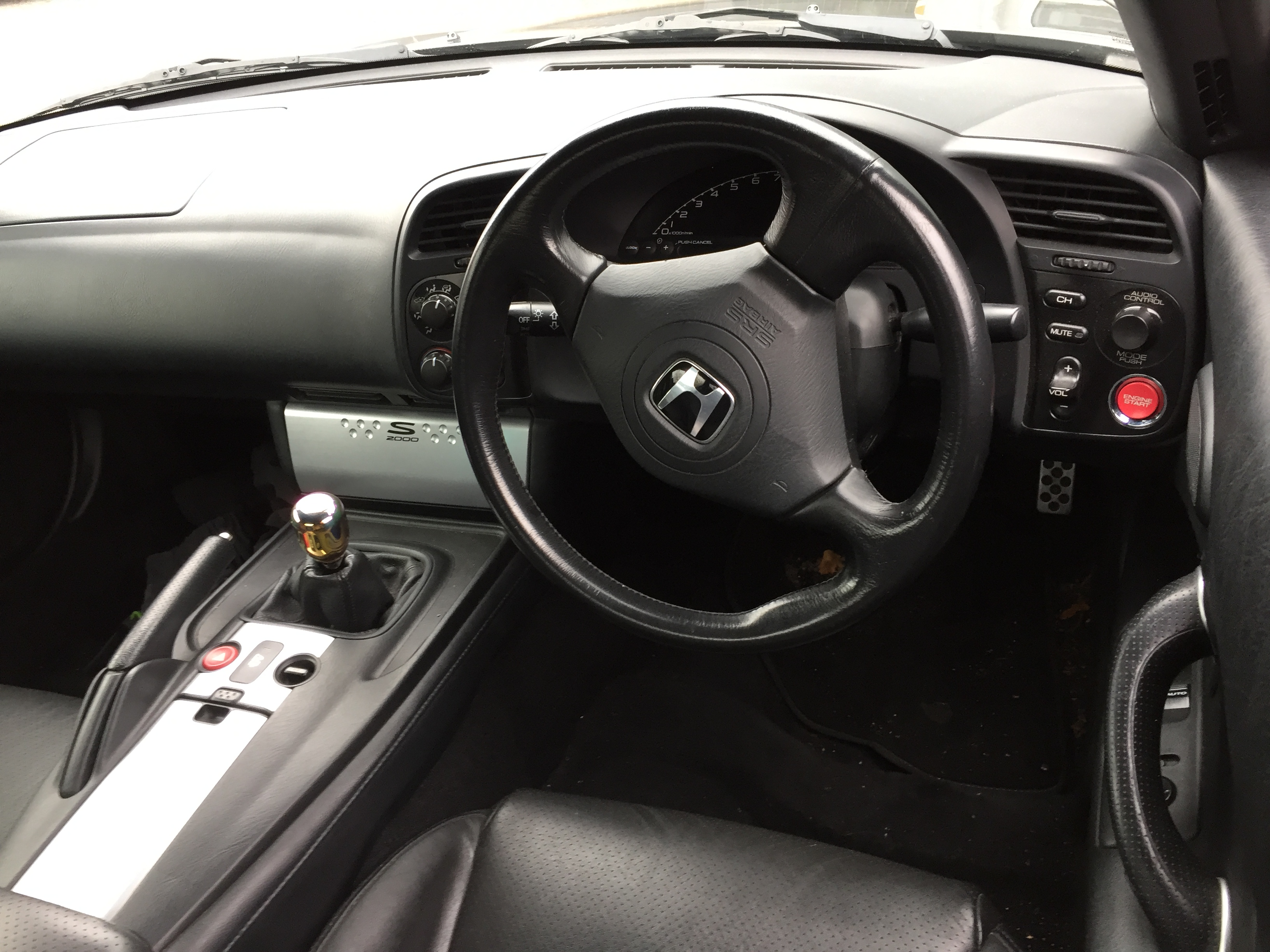 Honda S2000 Rechtslenker Cockpit